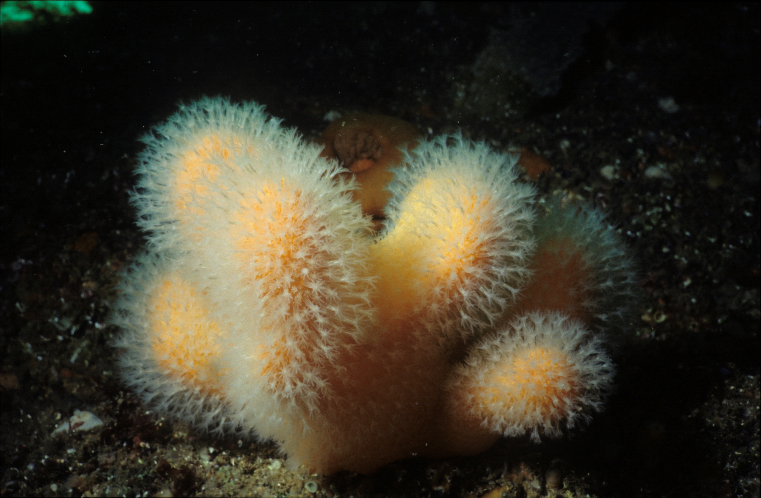 Alcyonium digitatum in Tegelskär, Kosterhavet national park